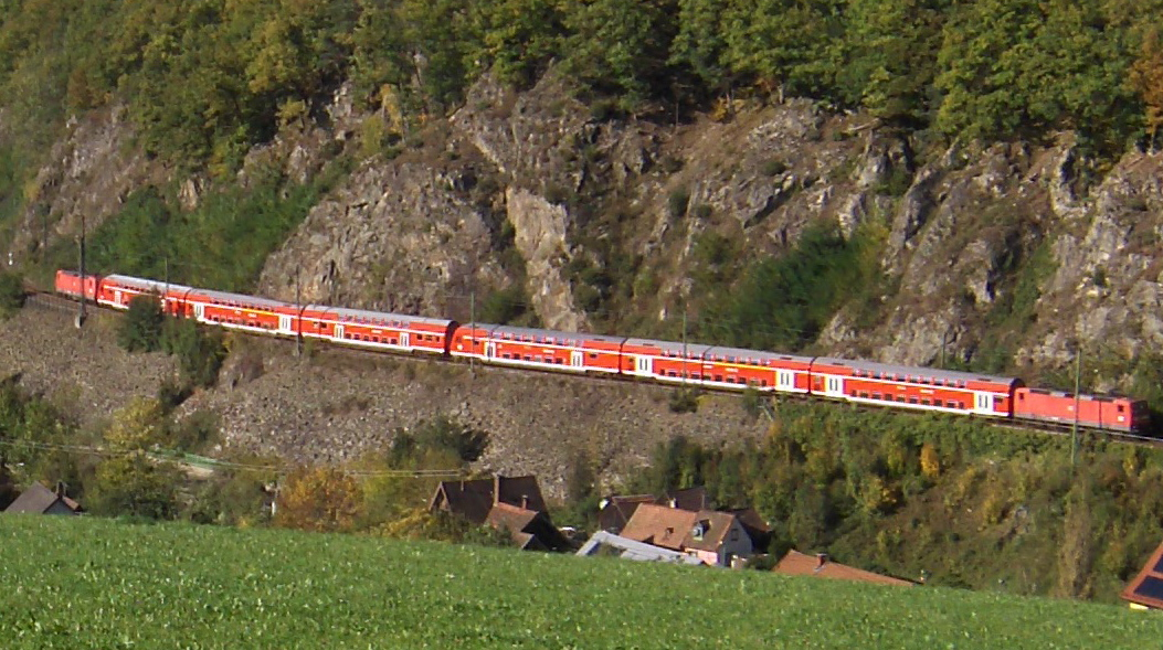 Zug von DB Regio mit 6 Doppelstockwagen und 2 Loks der Baureihe 143 auf der Fahrt ins Höllental oberhalb von Falkensteig.